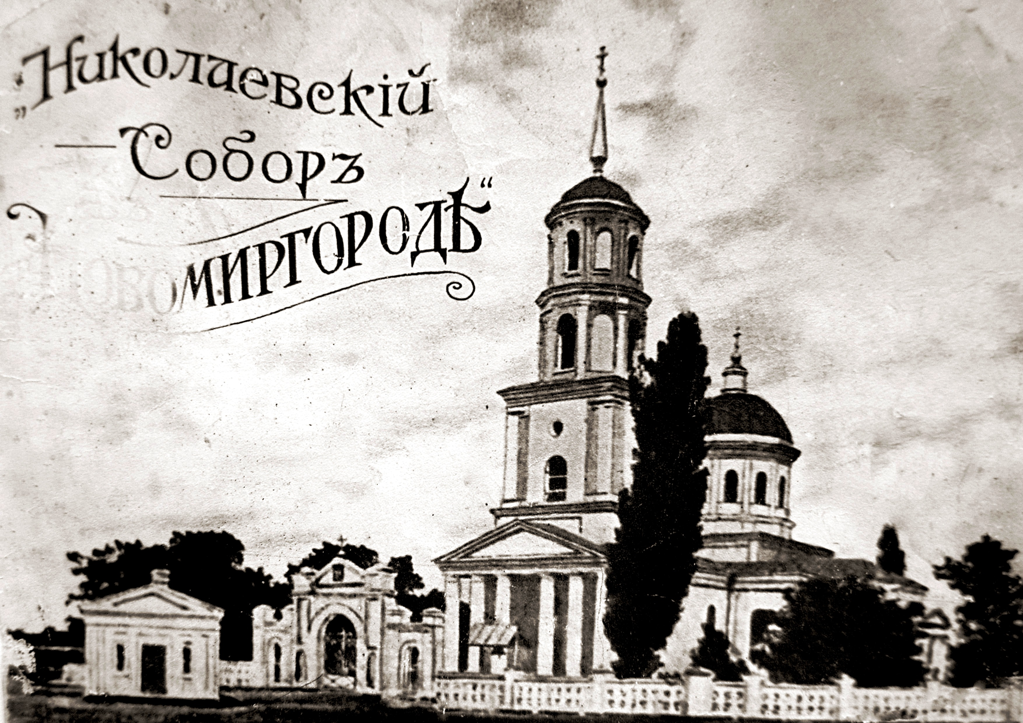 Николаевский собор в Новомиргороде. Дореволюционное фото